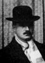 Vincenc Beneš, český malíř